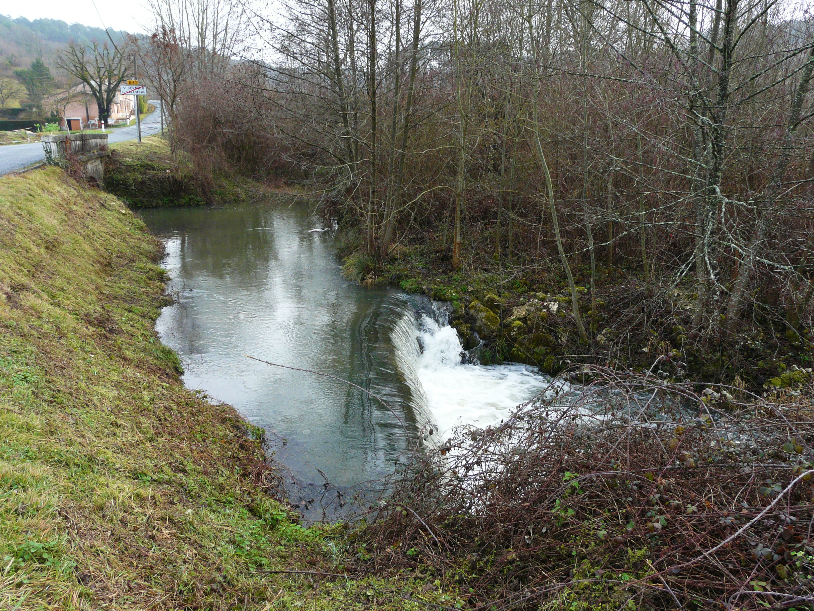 Le Salembre en aval du pont de la route départementale 41, Saint-Germain-du-Salembre, Dordogne, France